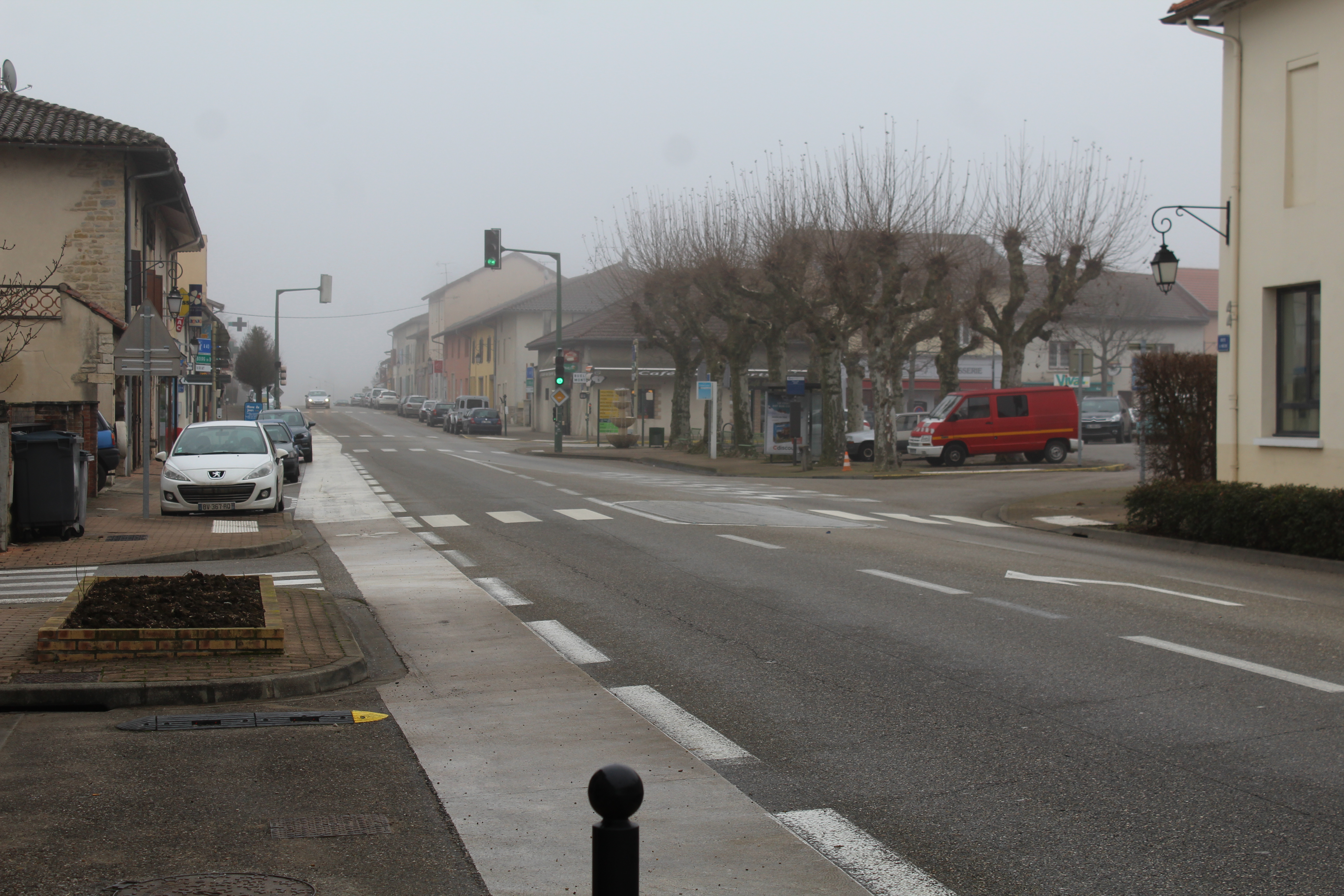 Route D1079 au centre de Polliat en direction de Mâcon.